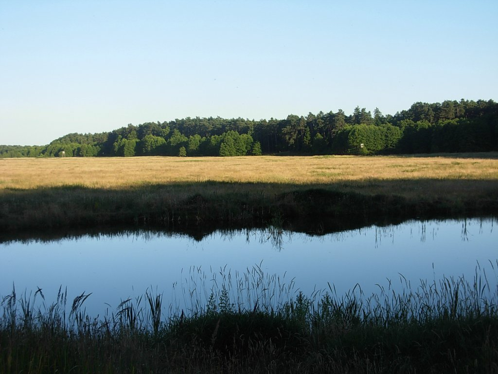 Puszcza Bydgoska - Łąki Studzienieckie